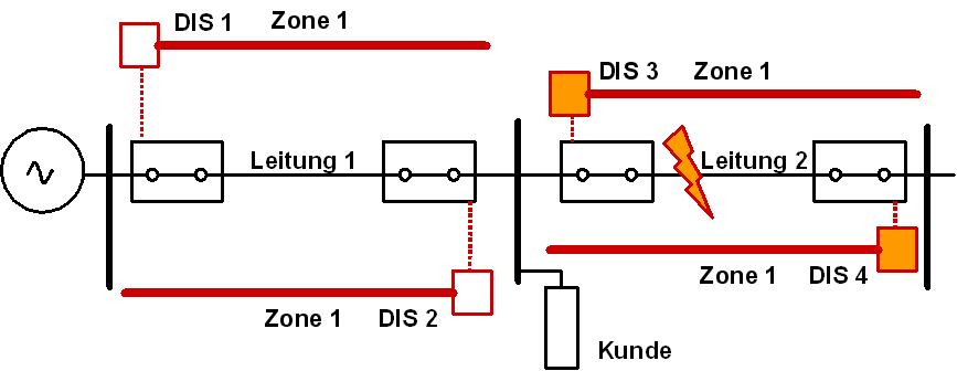 Schematische Darstellung eines Energienetzes mit optimaler Distanzschutzrelaiseinstellung.